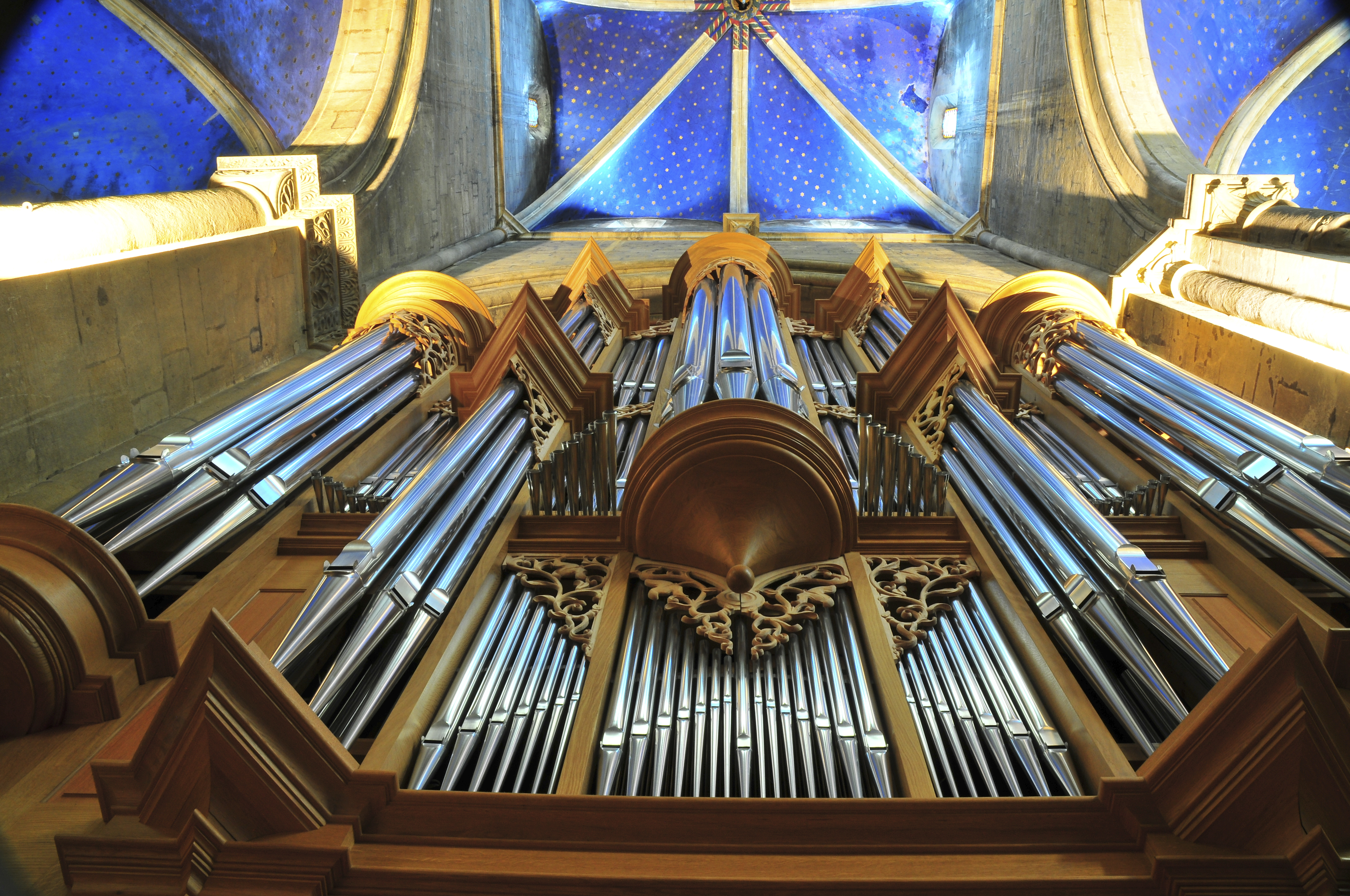 Neuchâtel, Collégiale de Neuchâtel